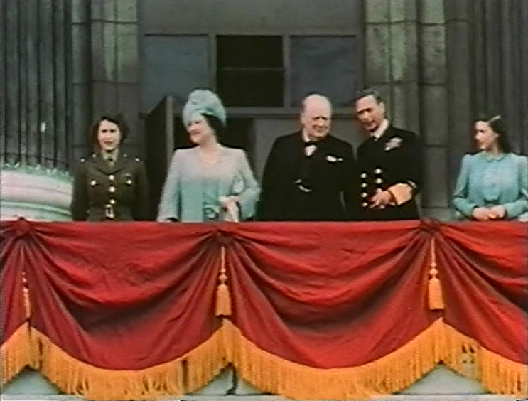 Prinzessin Elisabeth, Queen Elisabeth, Winston Churchill, Georg VI. und Prinzessin Margaret am Balkon des Buckingham Palaces. Anlass sind die Feierlichkeiten des VE-Day